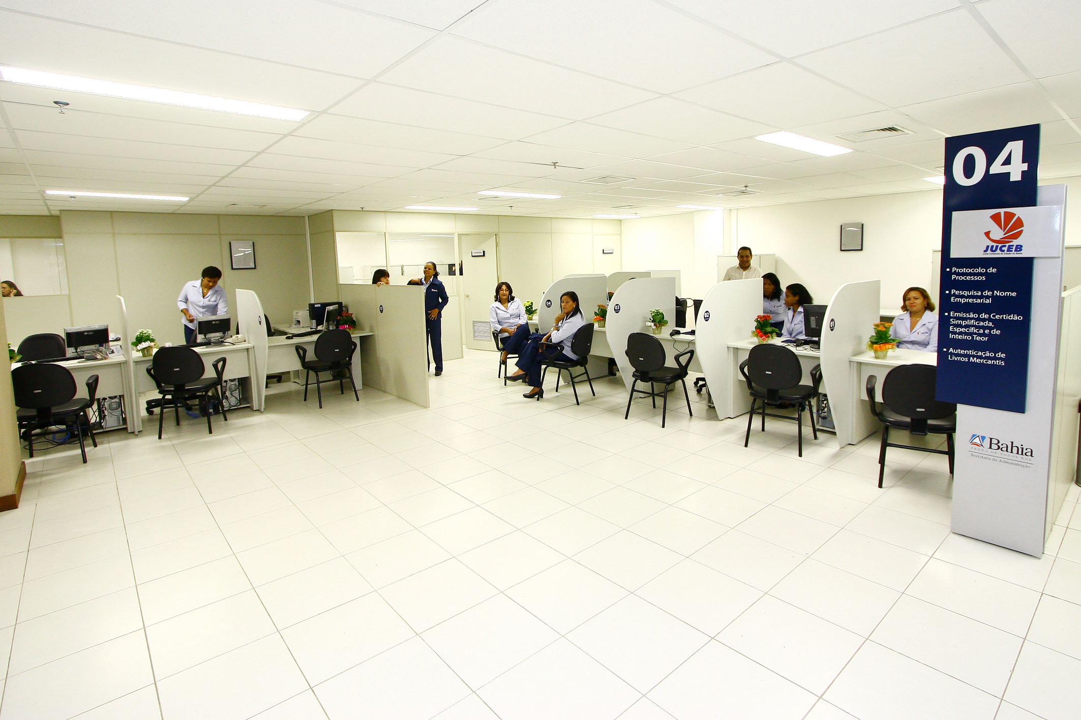 Governador Jaques Wagner Inaugura SAC no Salvador Shopping. Fotos: Ivan Baldivieso.